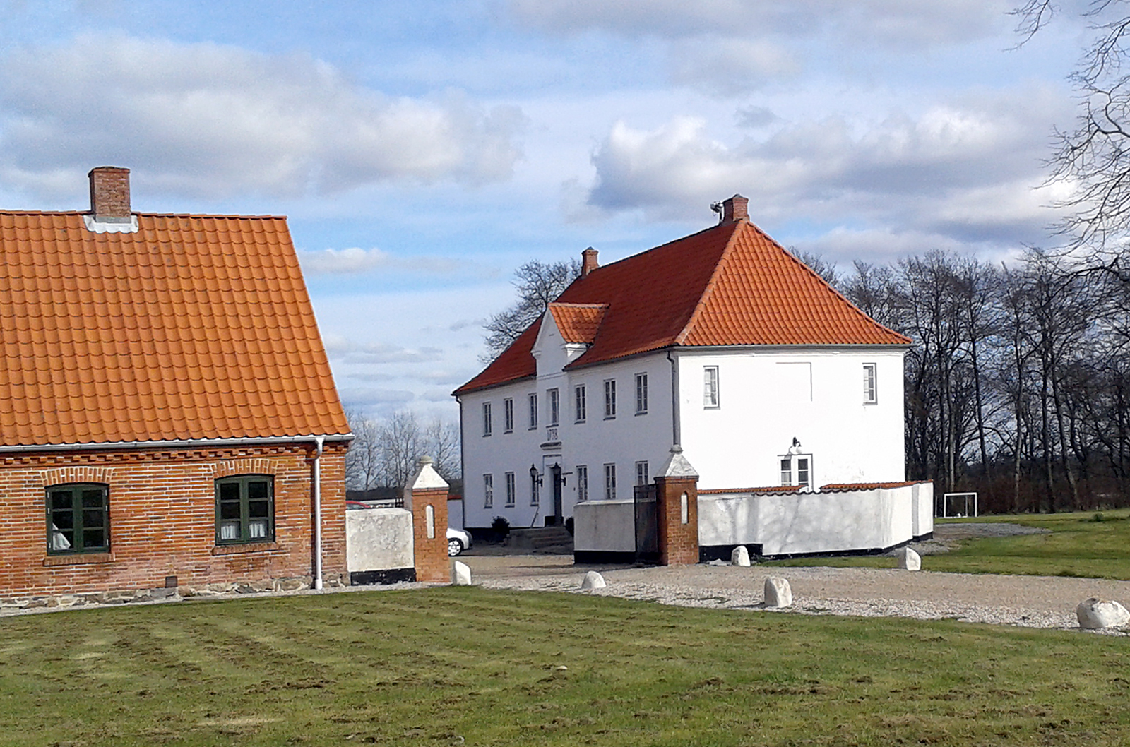 Strandet hovedgaard set fra nordvest